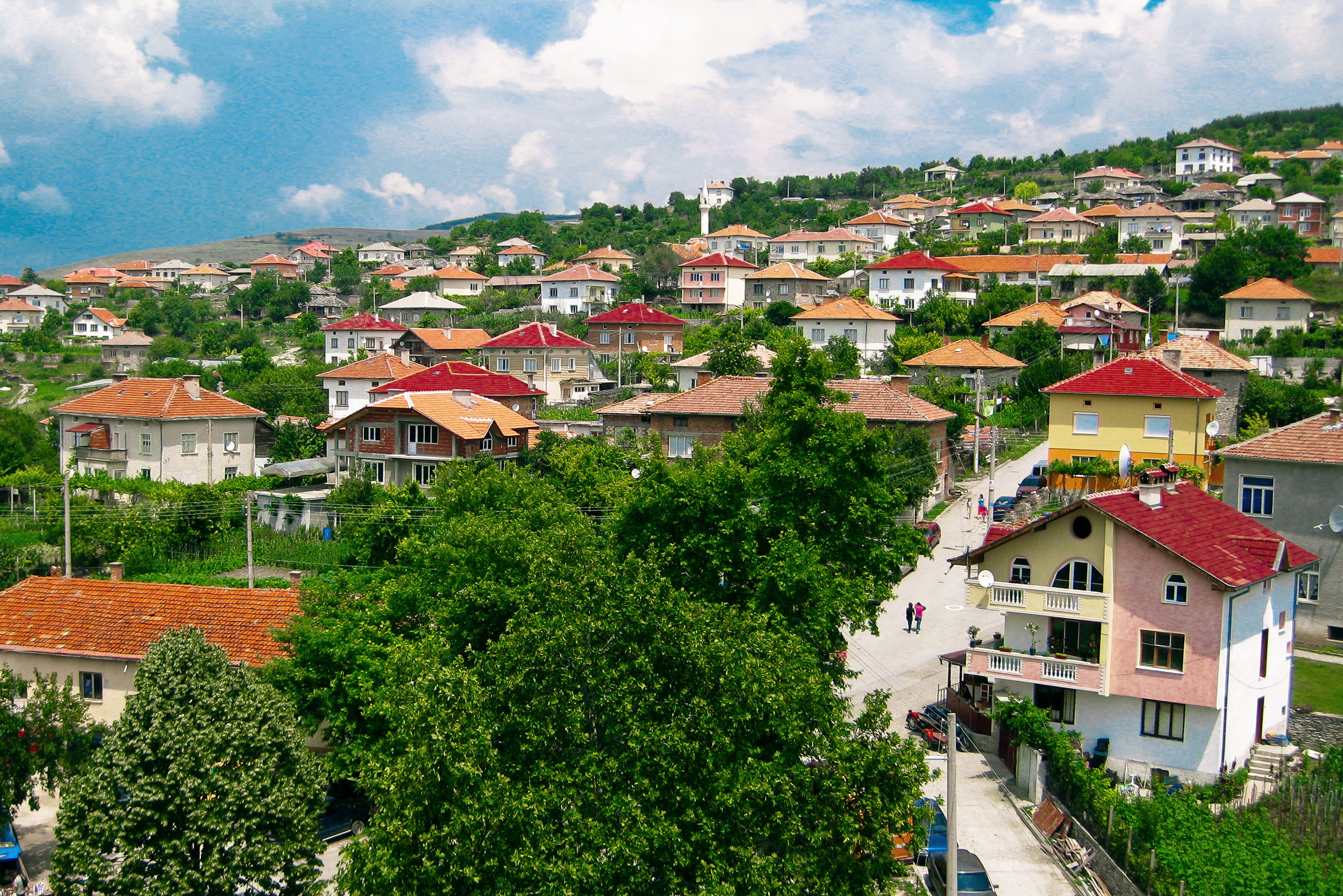 Гледка към село Туховища през лятото на 2009 г.